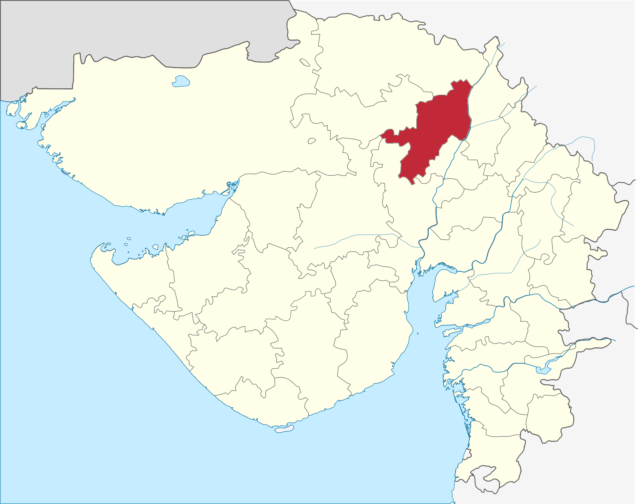 Distrito de Mahesana en Gujarat